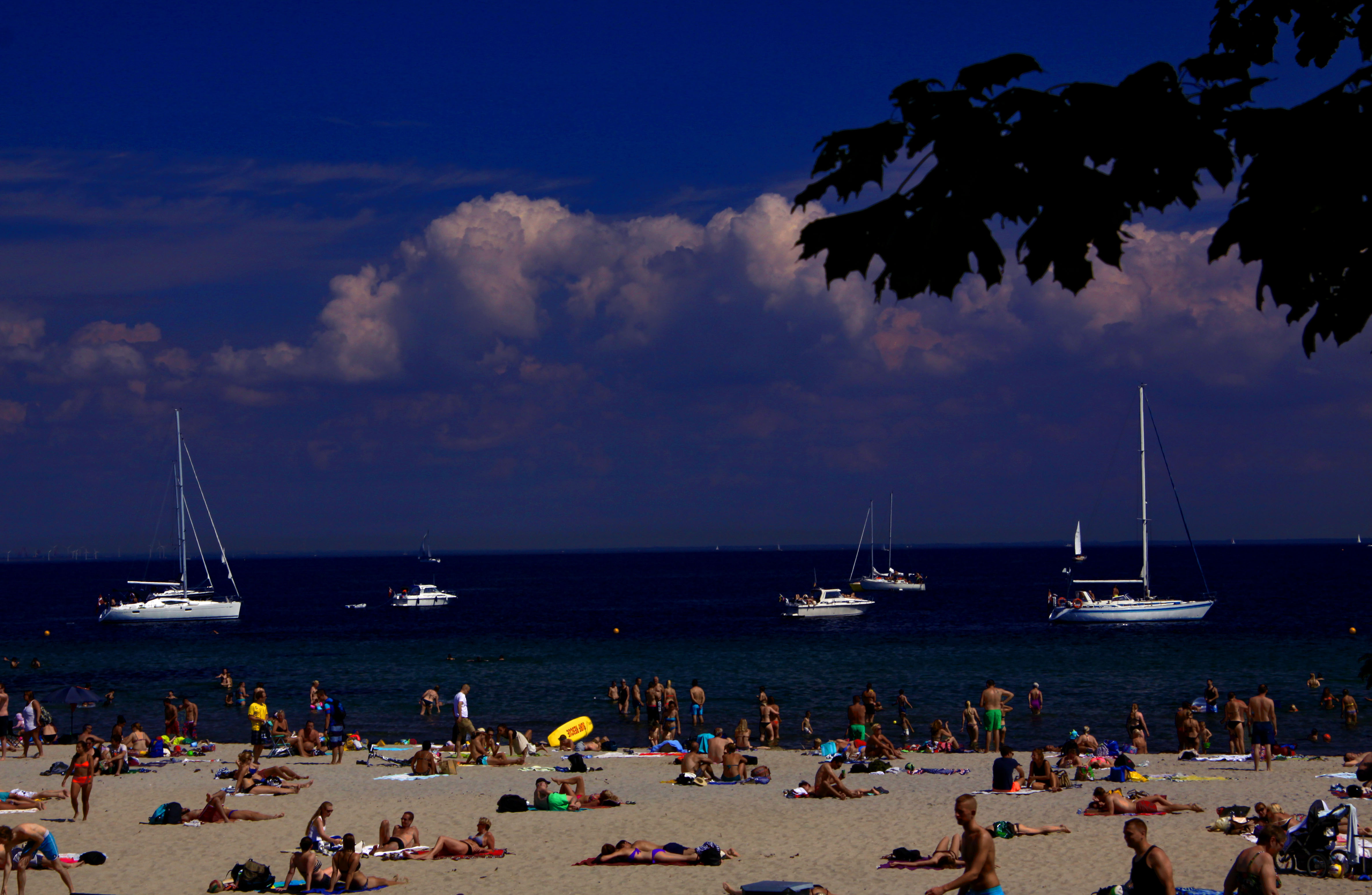 Klampenborg. På Bellevue Strandbad.